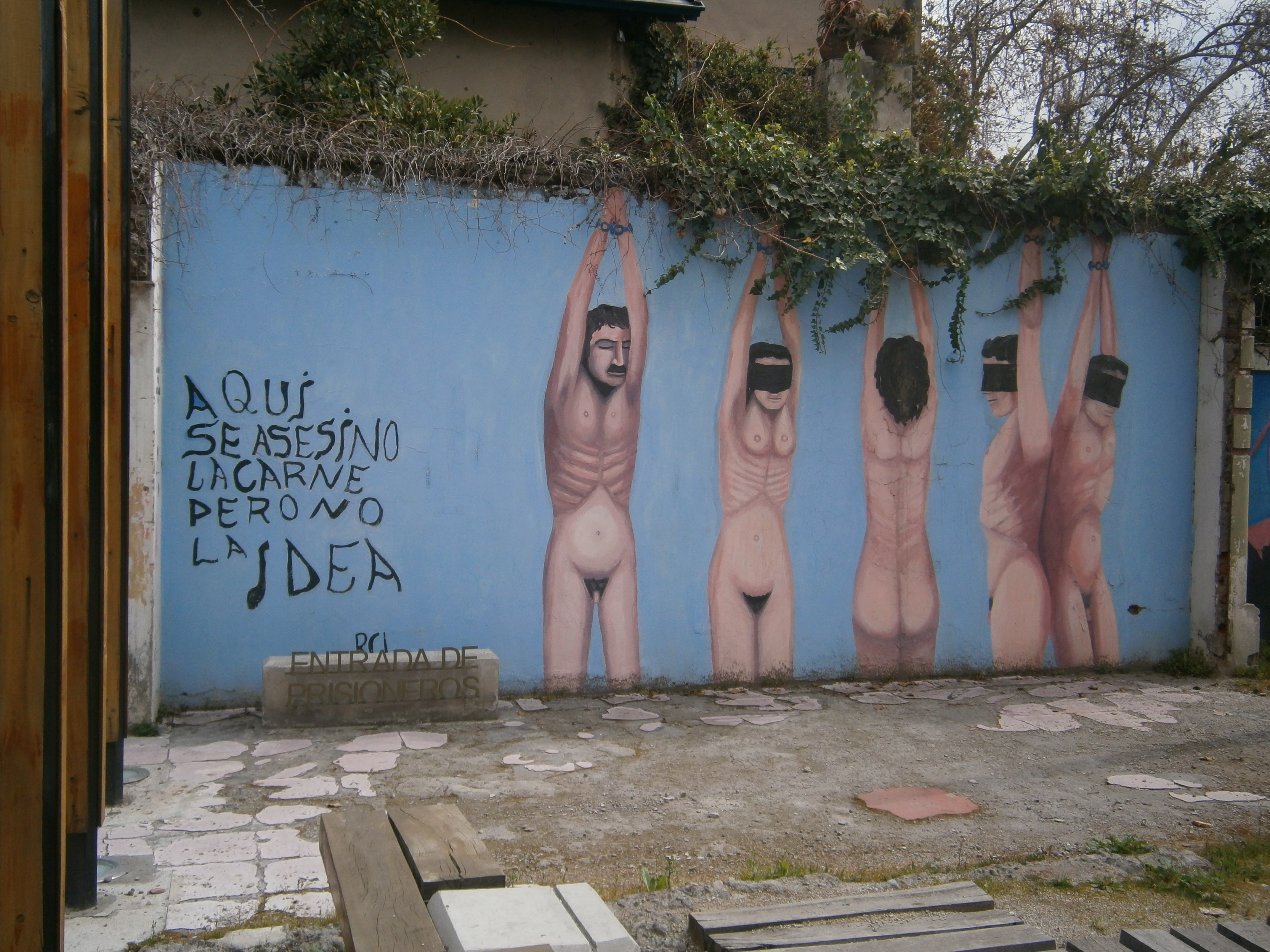 Sitio histórico ubicado en Av. José Domingo Cañas Nº 1367 This is a photo of a national monument in Chile: 481